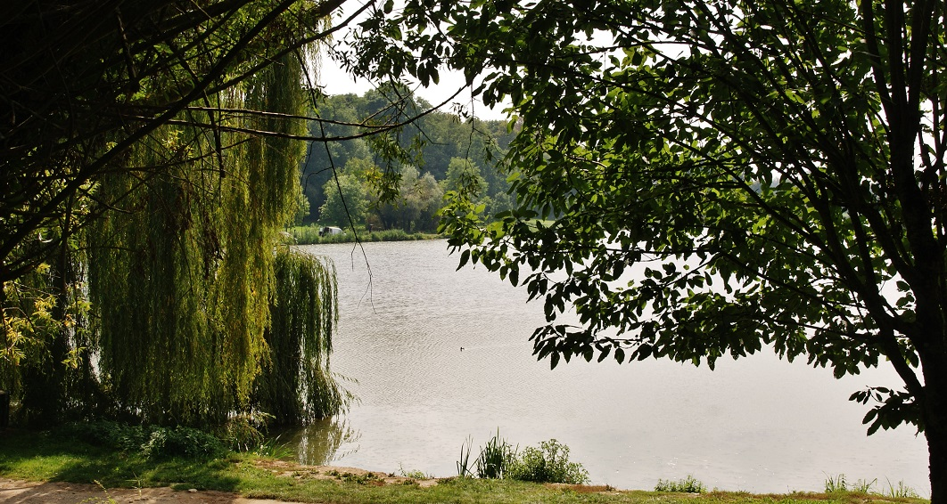 Le Lac